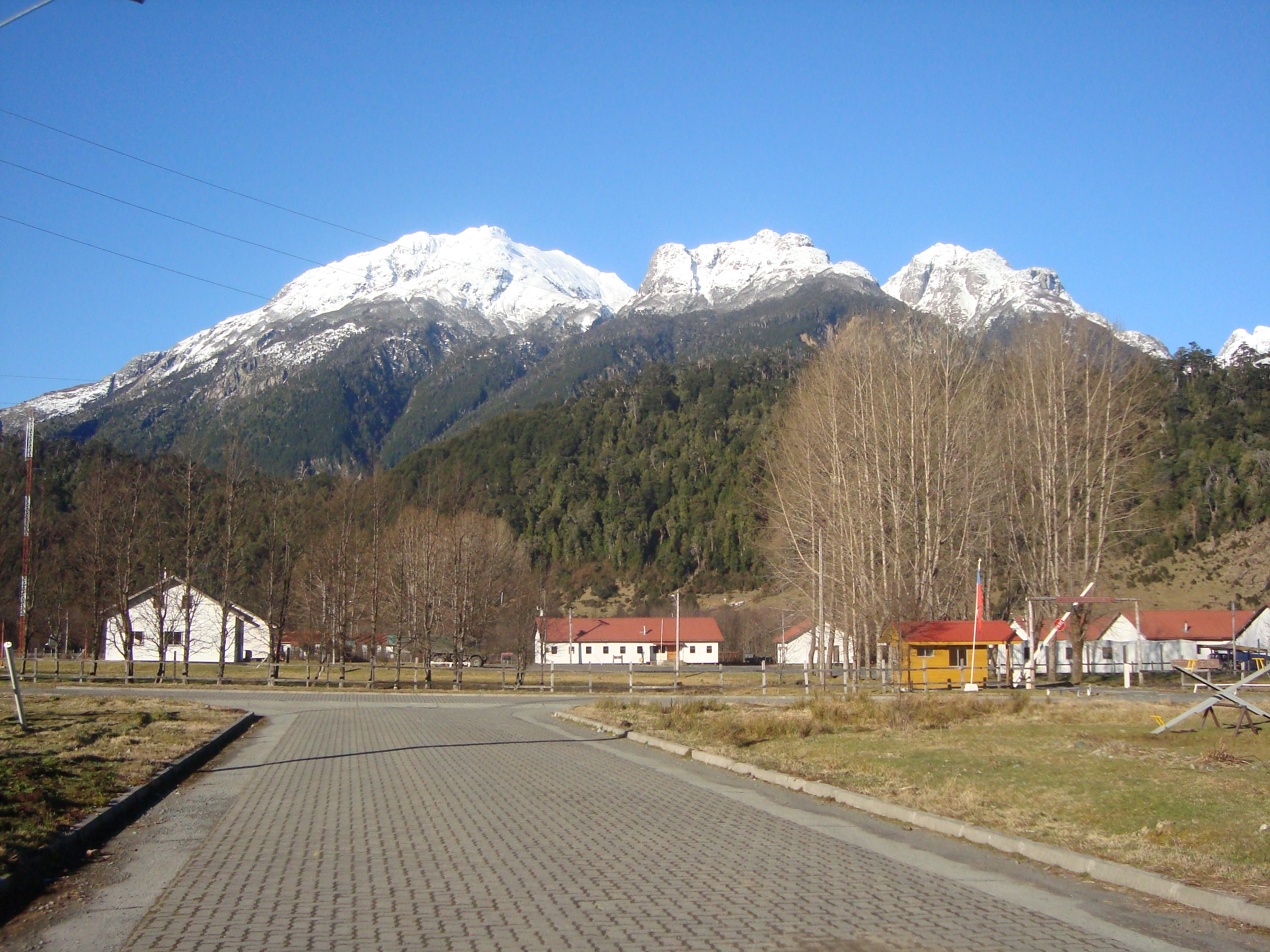 Valle del río Frío